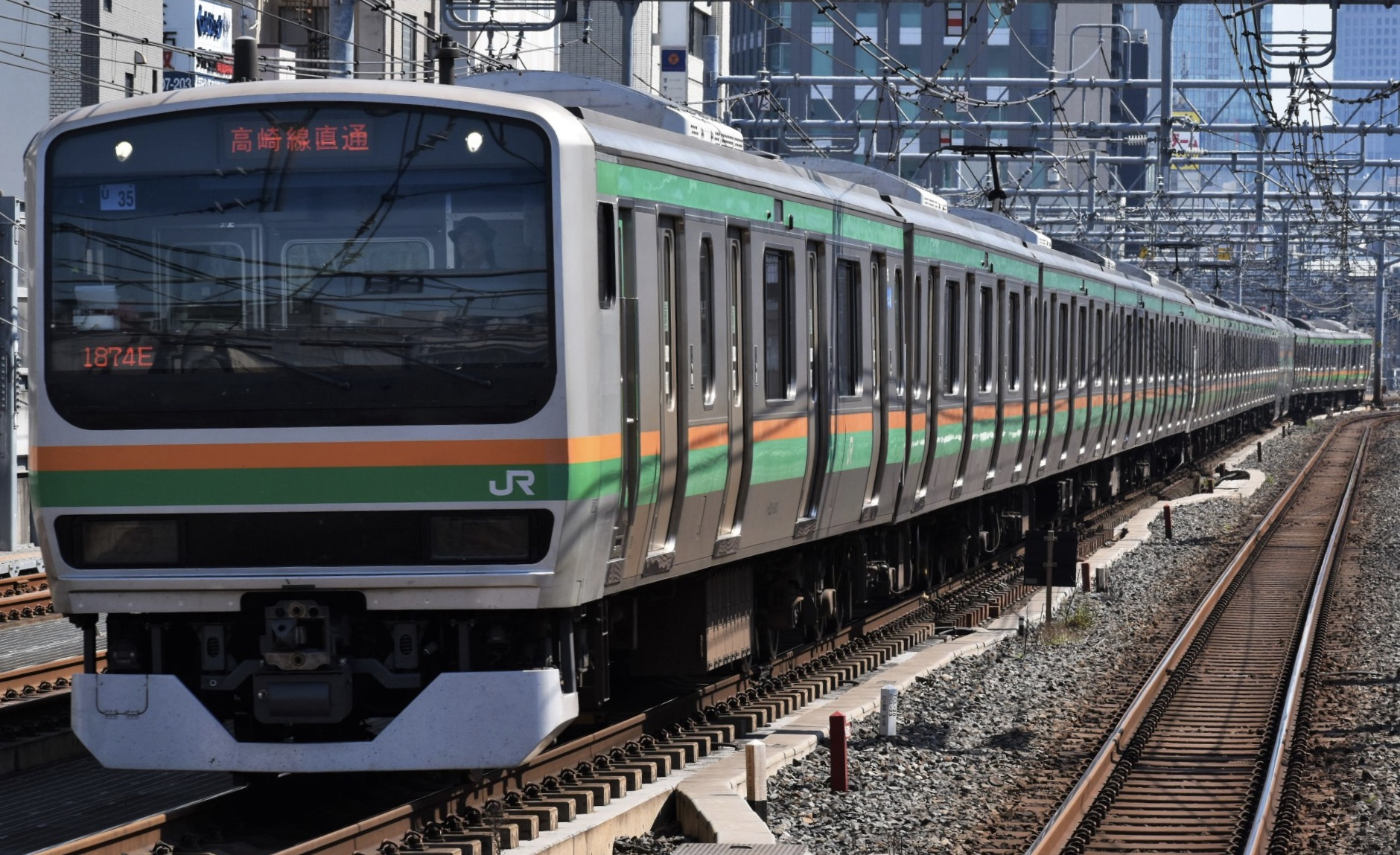 御徒町駅を通過する上野東京ラインE231系1000番台+E233系3000番台